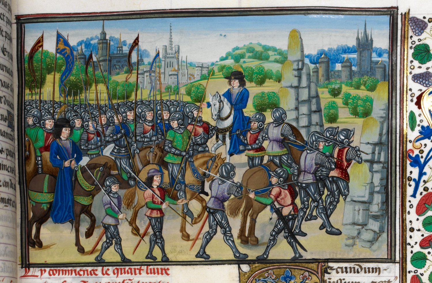 BL-Royal 19Ev-f125-K90058-31a L’armée romaine en guerre avec Carthage.